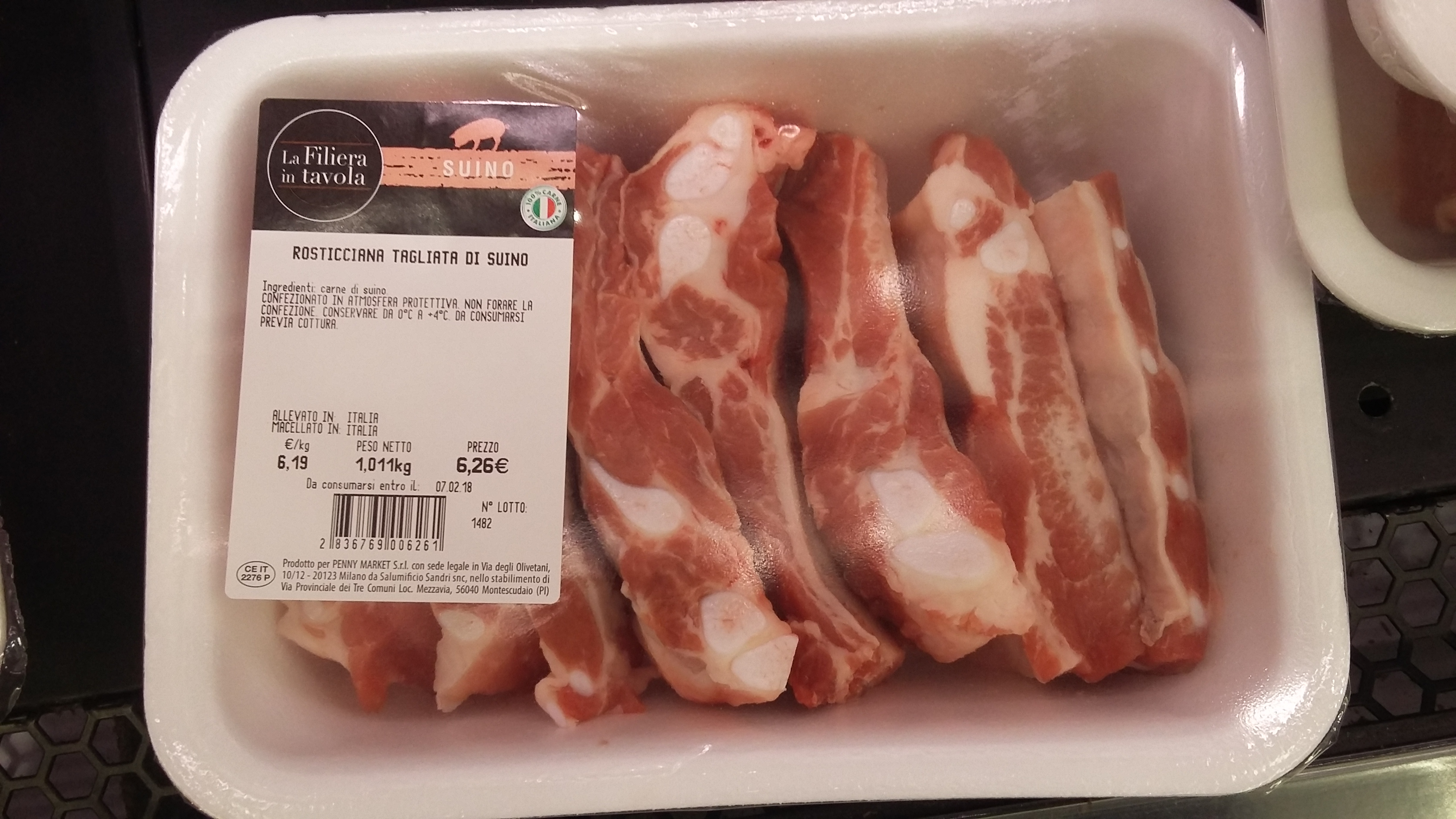 Rosticciana ancora sul bancone del supermercato